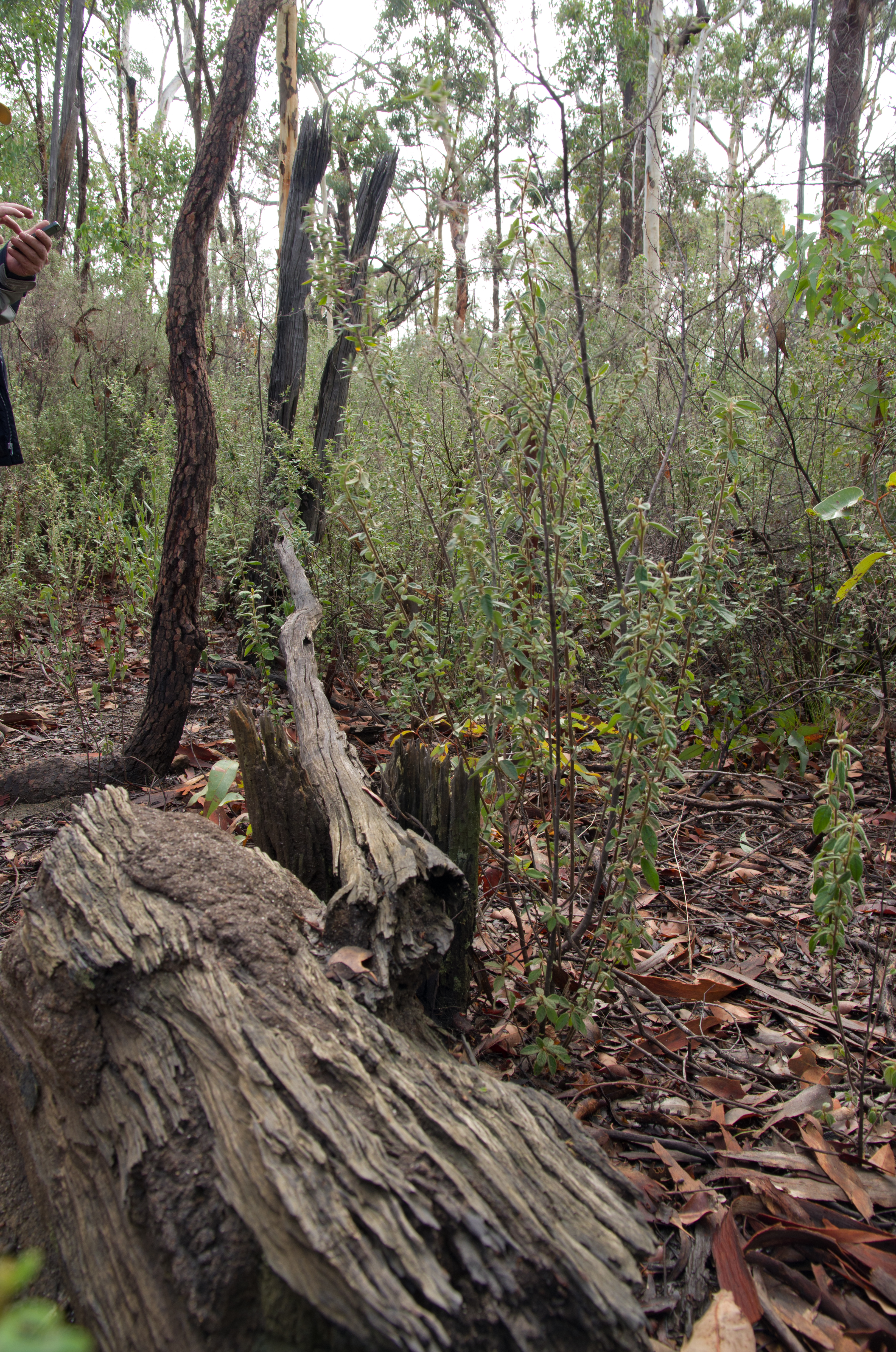 Moondyne Joe's gate